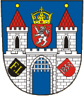 znak obce